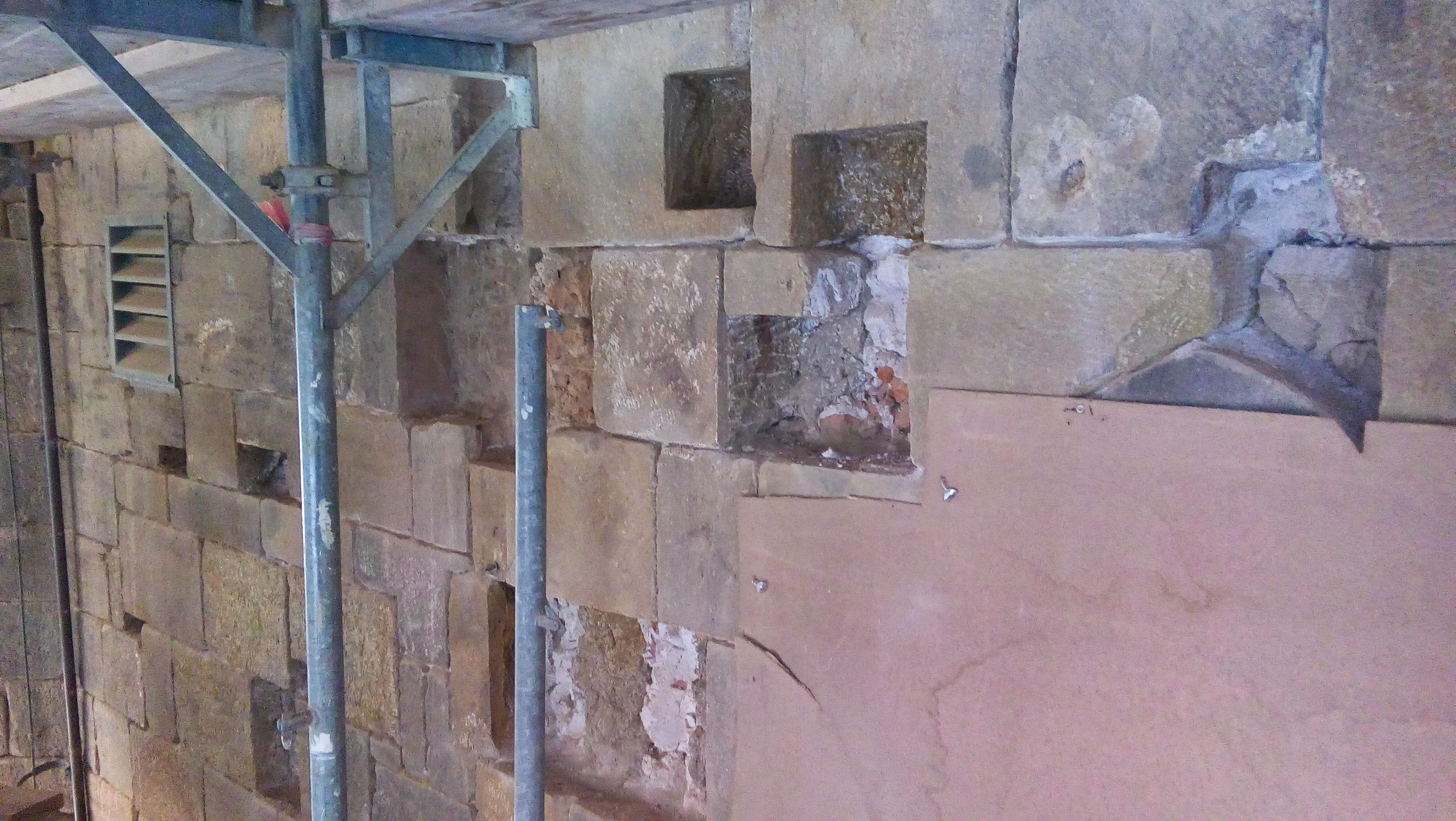 Sandsteinarbeiten an der Liebfrauenkirche Bremen.